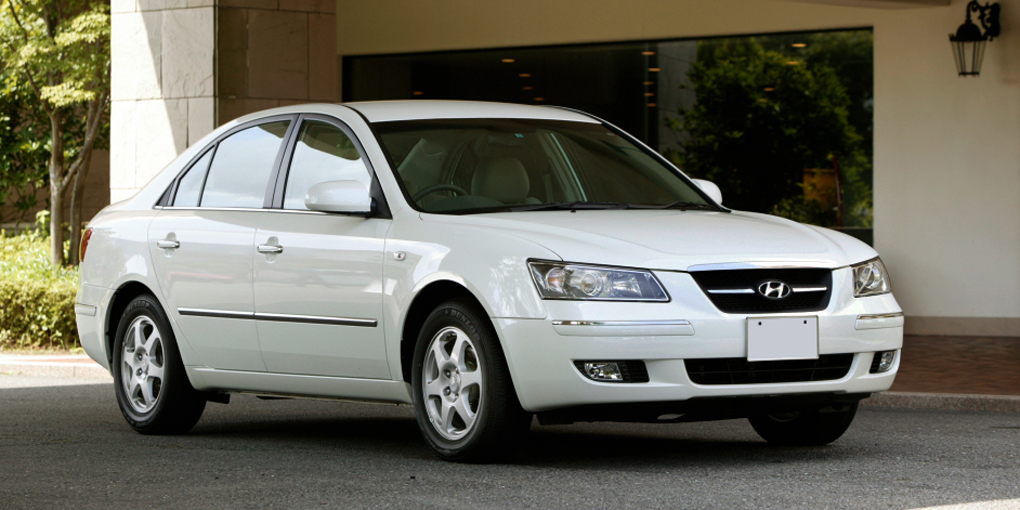 2006 Hyundai Sonata F24 Elegance Special.